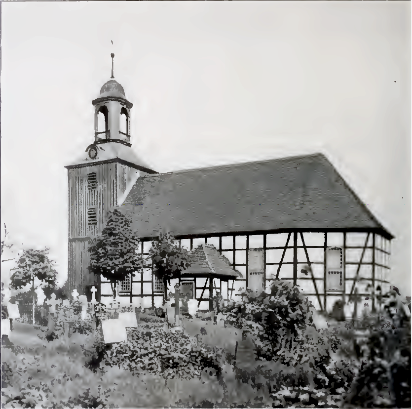 Kirche in Aurith, Brandenburg, Germany - Urad, Polen, vor 1913